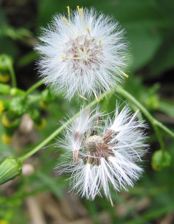 zelfgemaakte foto; klein kruiskruid bloemhoofdje met zaadpluis